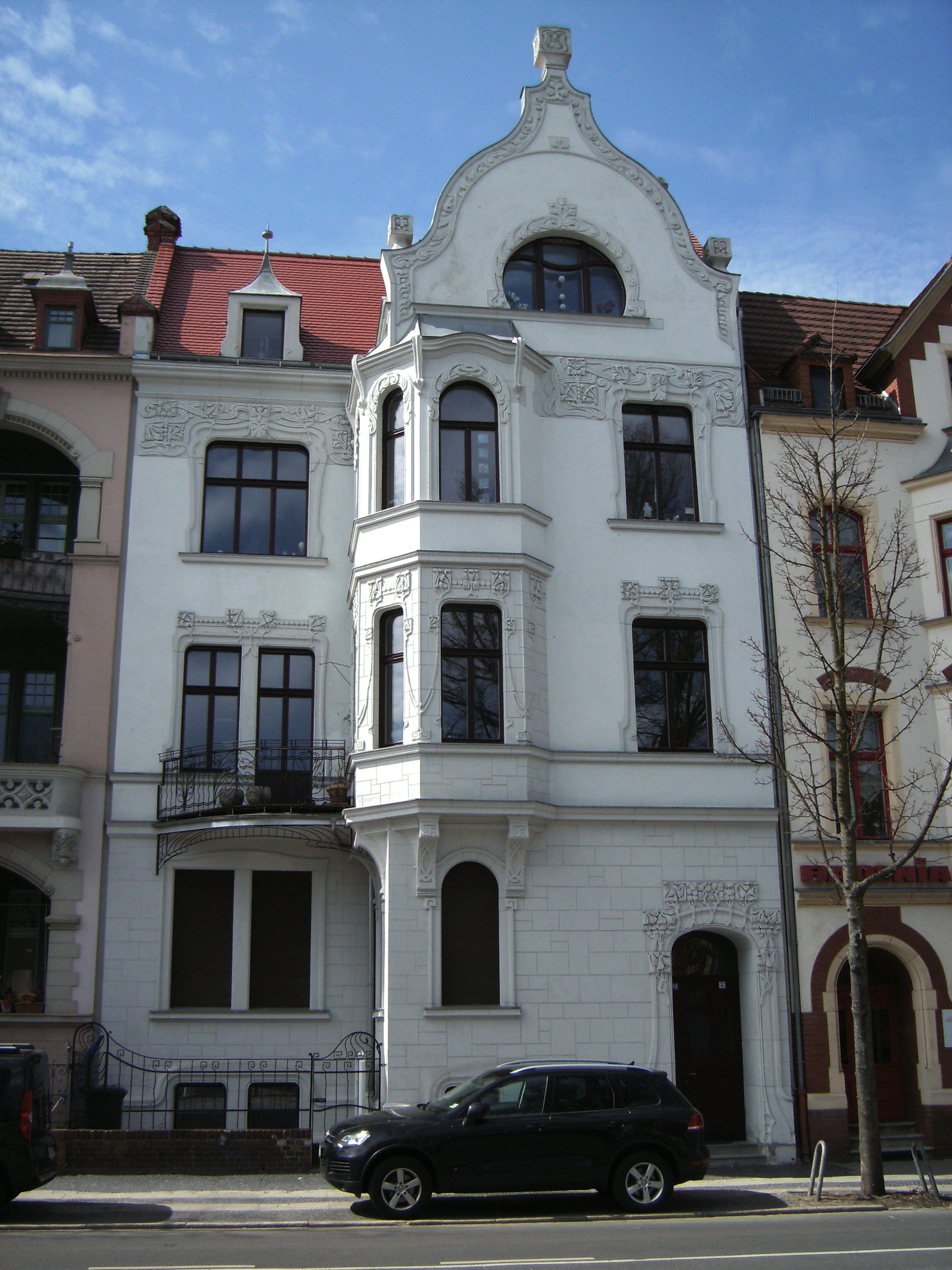 Schillerstraße 48,1